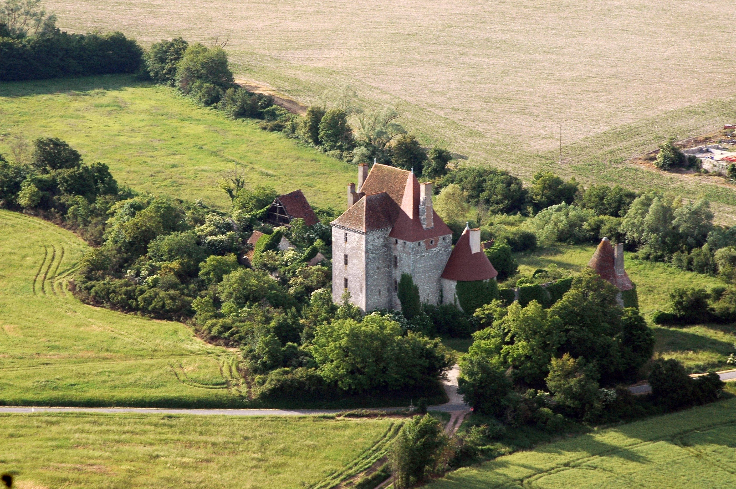 Le château de Fourchaud à Besson, Allier, France.